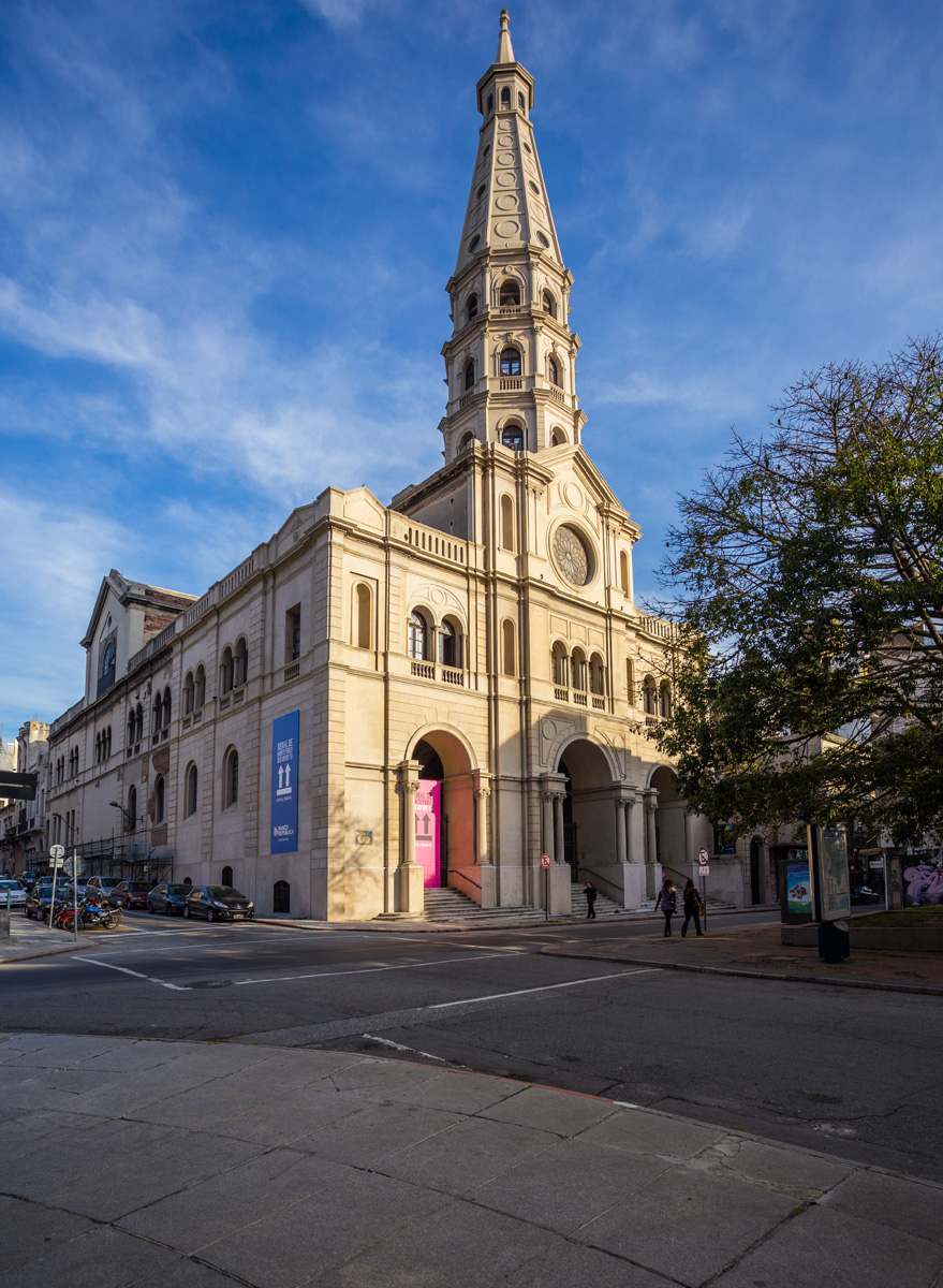 Iglesia San Francisco de Asís. Ubicada en el departamento de Montevideo